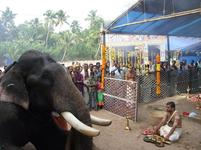 നാല്പത്തെണ്ണീശ്വരം-വിനായകചതിർത്ഥി-ഗജപൂജ